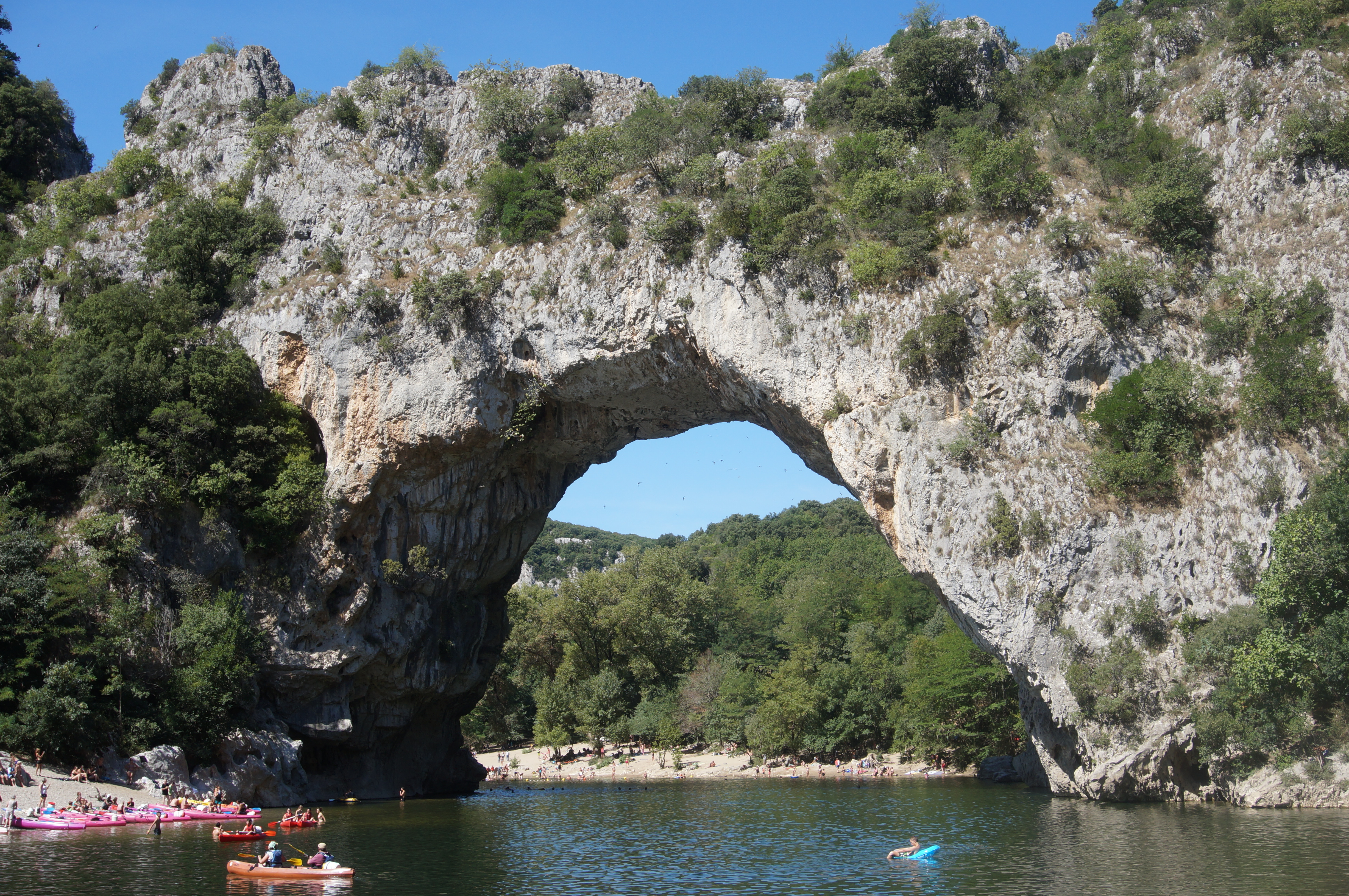 Le Pont d'Arc en Ardèche, début des gorges de l'Ardèche